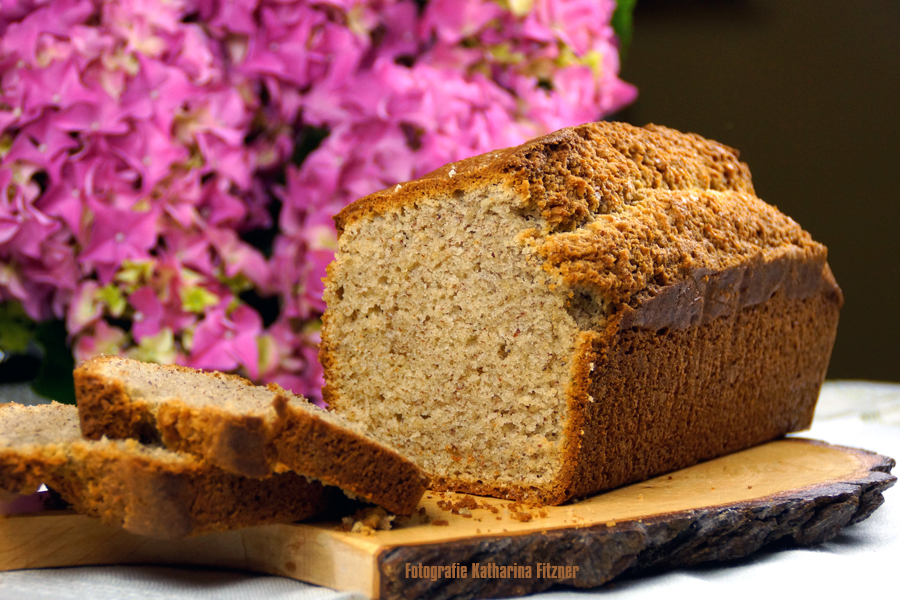 So sieht der ausgebackene Franziskusbrot aus.